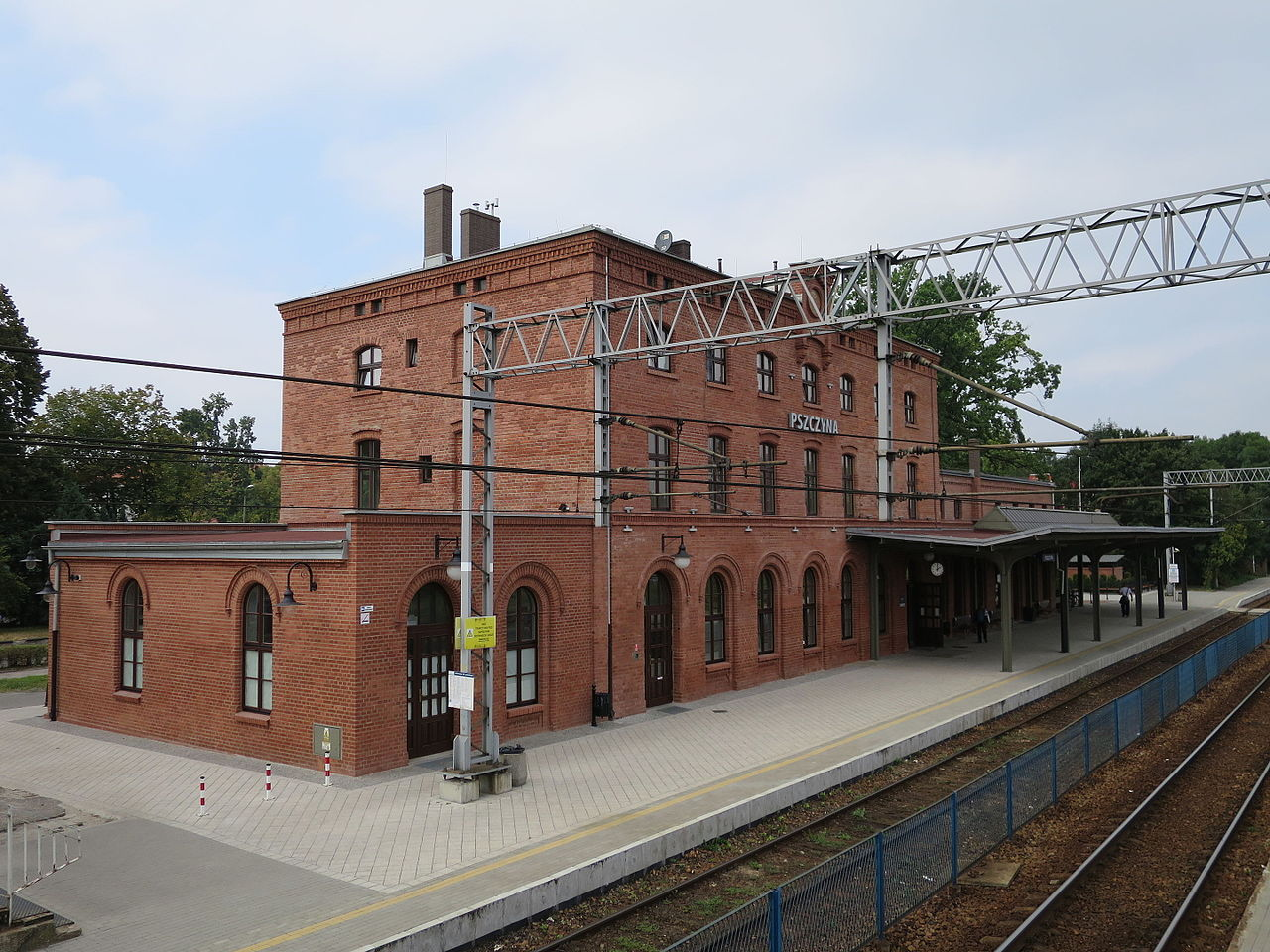 Dworzec PKP w Pszczynie po modernizacji w 2014 roku.